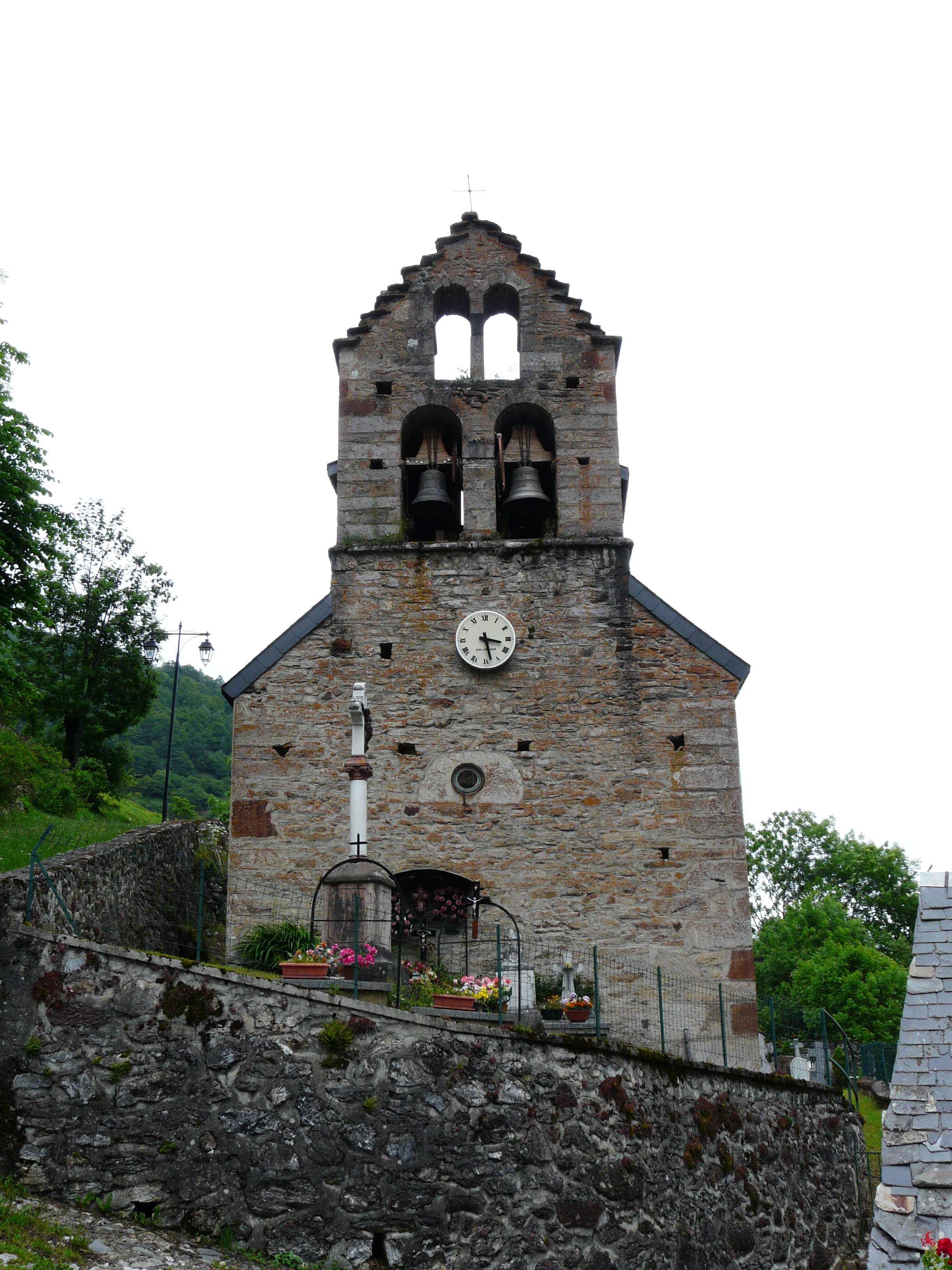 La façade ouest de léglise de la Présentation, Bourg-d'Oueil, Haute-Garonne, France.